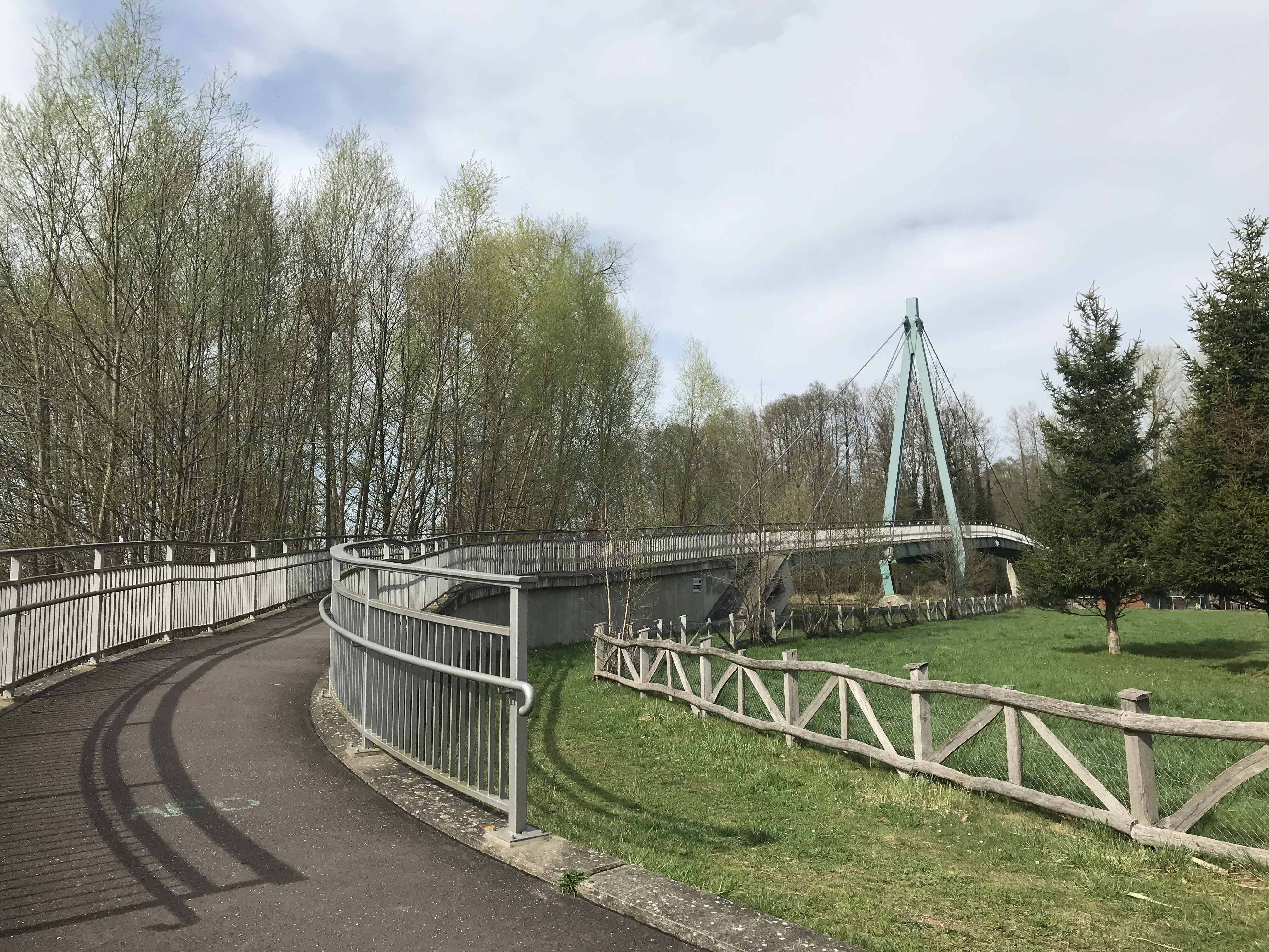 Dahme-Radweg, 123km lange Verbindung entlang der Dahme in Brandenburg